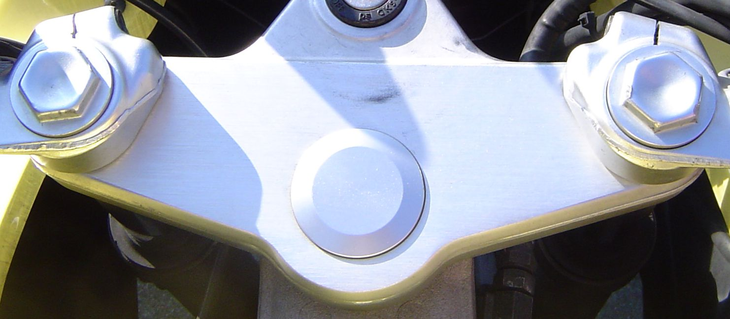 De bovenkant van de voorvorkpoten (links en rechts) zit verder naar voren dan het balhoofd (midden). Bovenste kroonplaat: in het midden het balhoofd en links en rechts de poten van de voorvork.